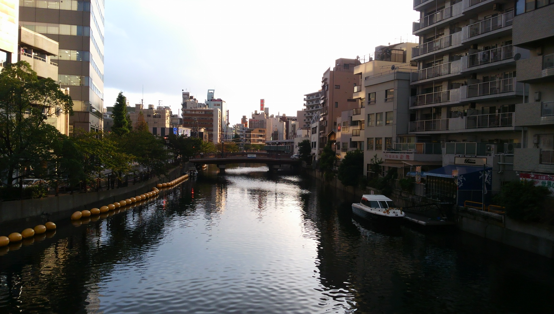 神奈川県横浜市を流れる大岡川。桜川橋より撮影。写っている橋は都橋。